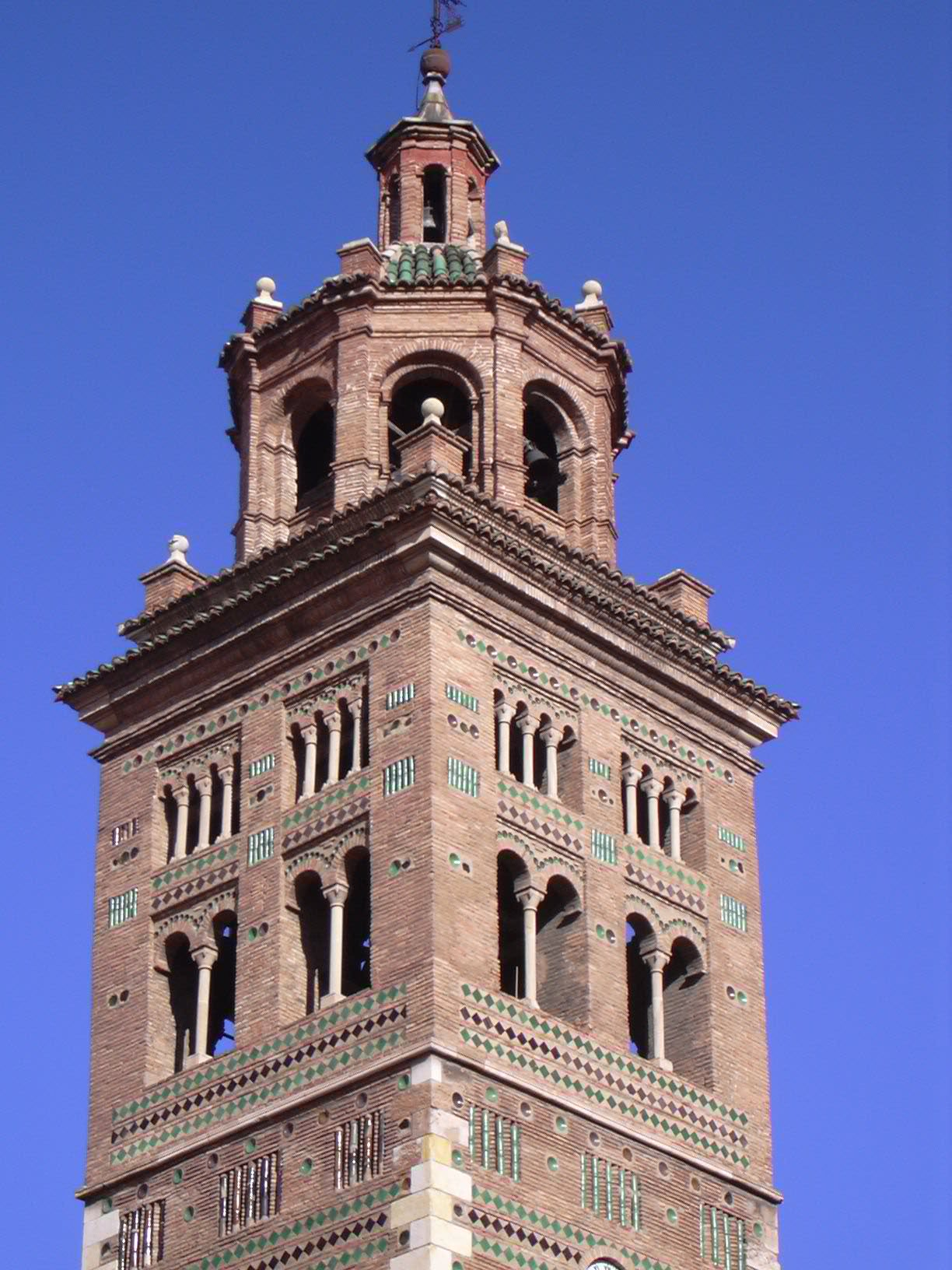 Teruel - Torre de la catedral